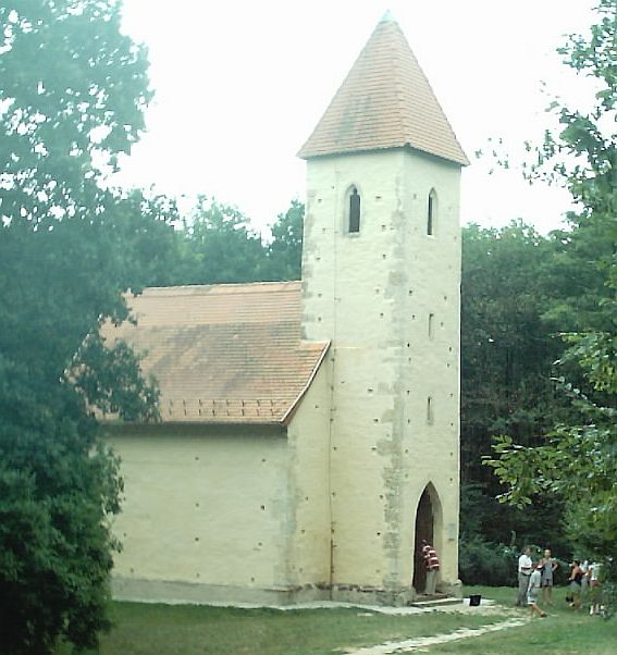 A veleméri (Vas m.) 13. századi templom